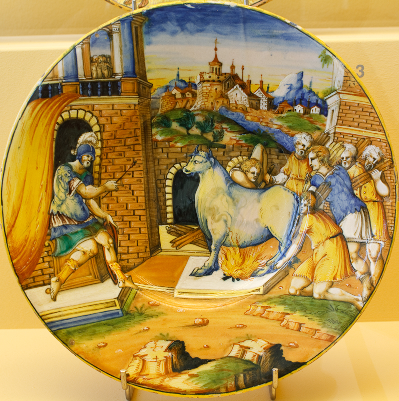 Istoriato schotels (Toegepaste kunst en Design, zaal 42) Italie Schotel: Porileus wordt door Phalaris in bronzen stier verbrand, 1550-1570 Majolica, Istoriatostijl Aankoop 1955 A3297 (KN&V) Italy Dish: Phalaris burning Perilaus in a bronze bull, 1550-1570 Majolica, Istoriato style Purchase 1955 A3297 (KN & V)